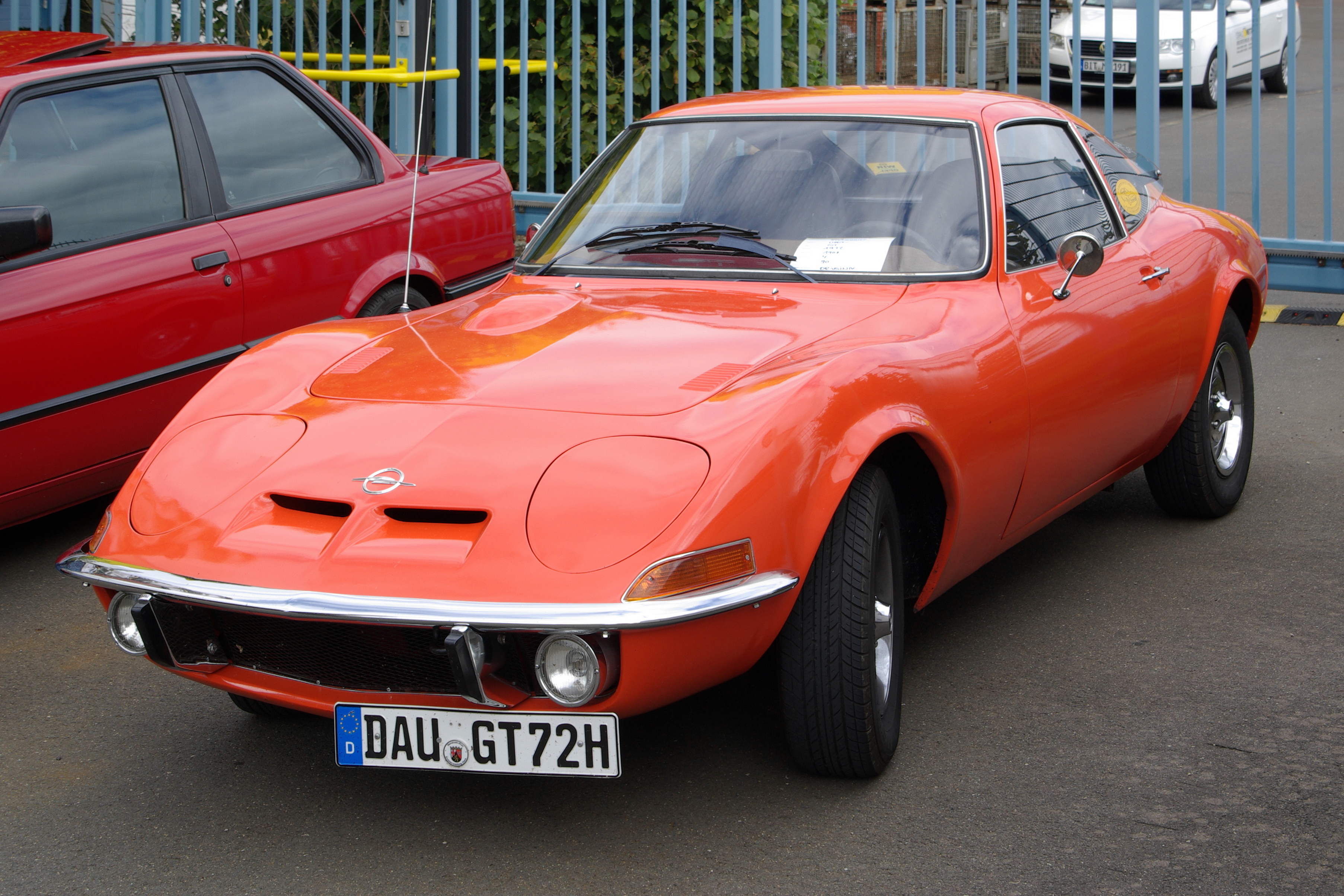 Opel GT, Baujahr 1972, 1900 cm³, 4 Zyl., 90 PS, Bitburg Classic 2012